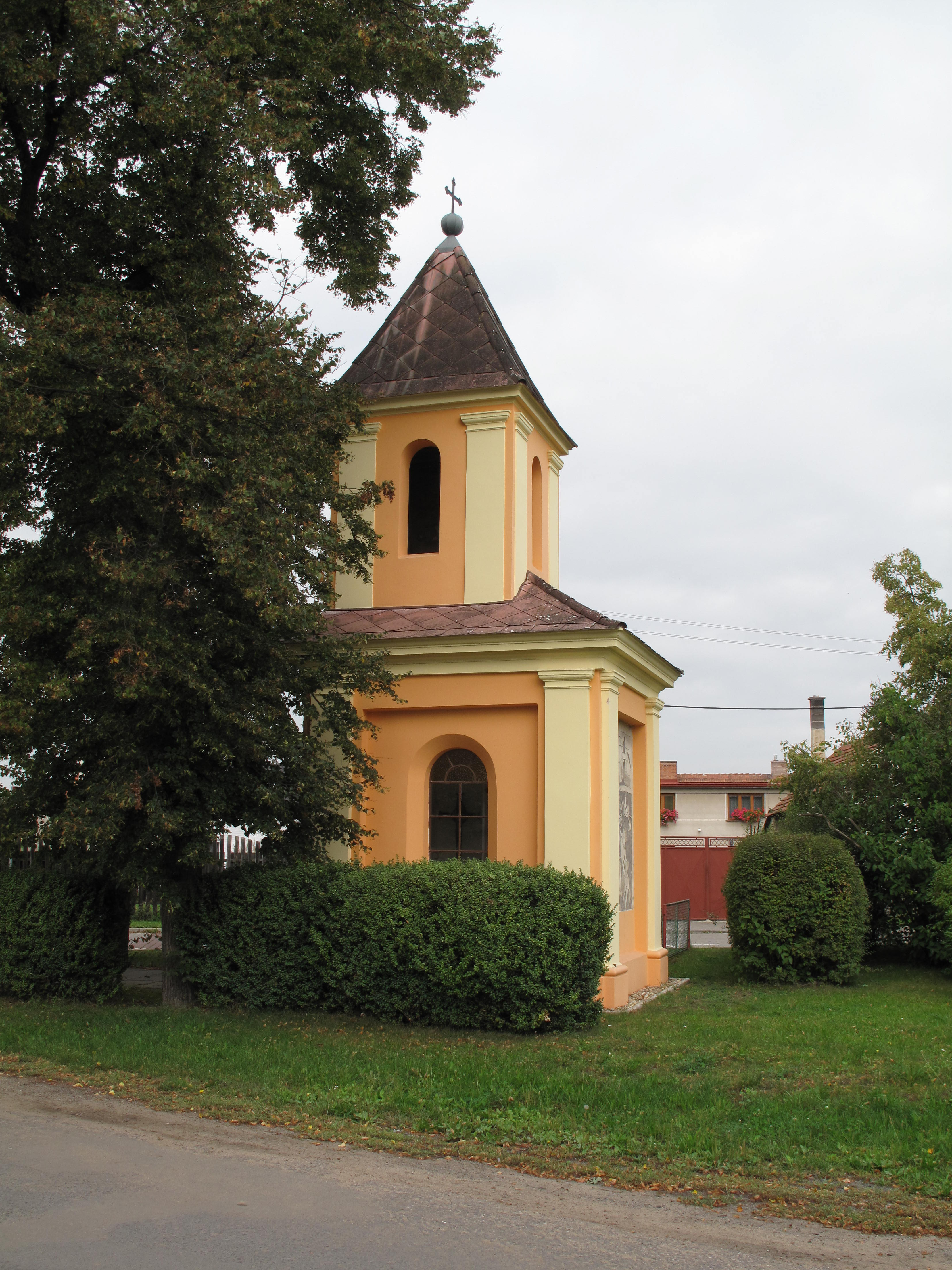 Česky: Tuhaň